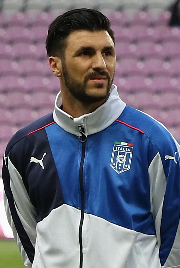 20150616 - Portugal - Italie - Genève - Roberto Soriano